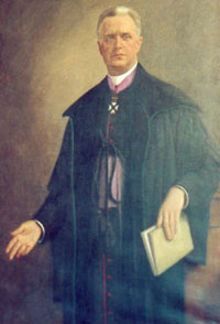 Simon Deploige - hoogleraar te Leuven